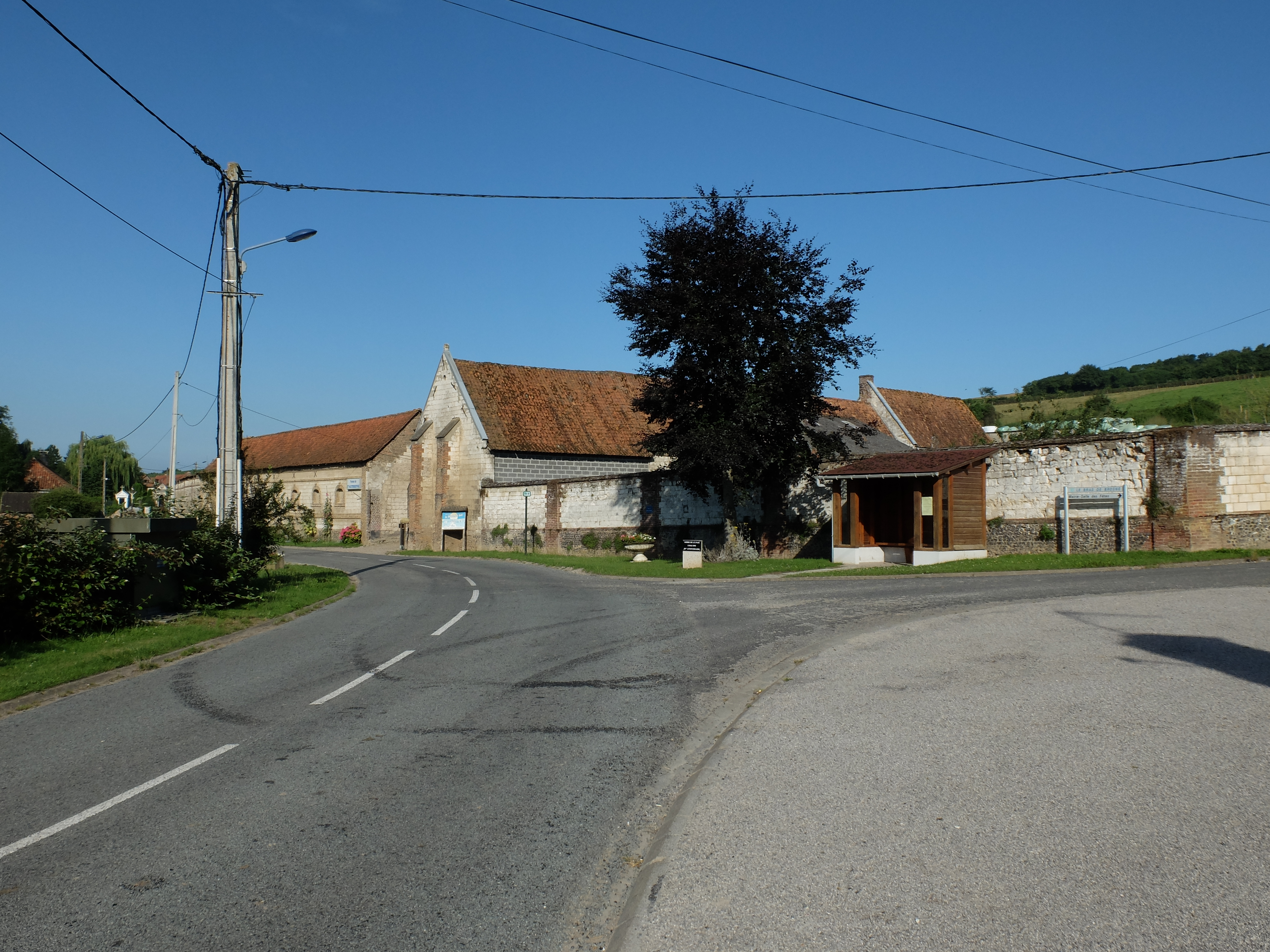 Vue de la rue du Bras de Brosne de Marant.